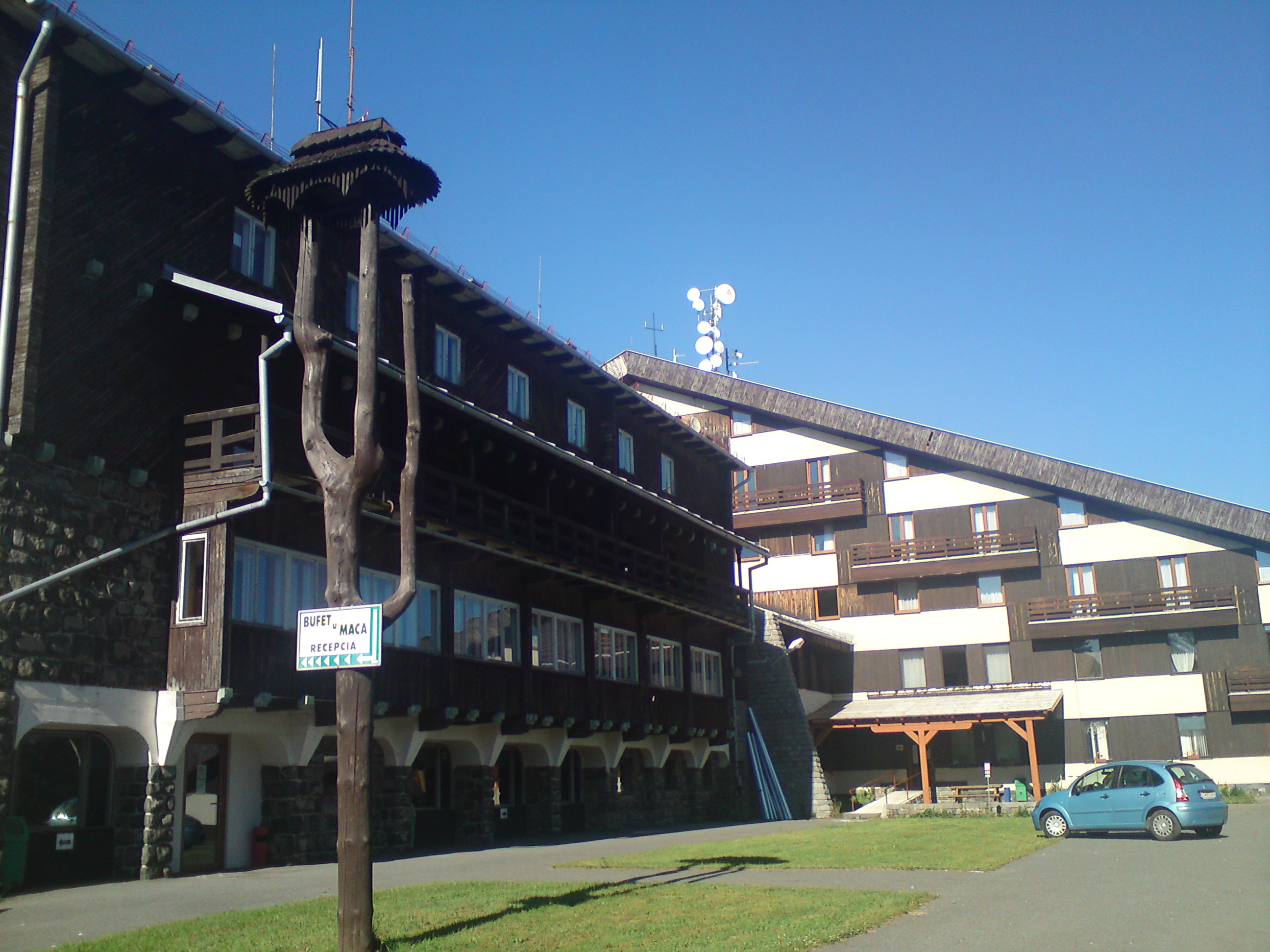 Horský hotel Poľana